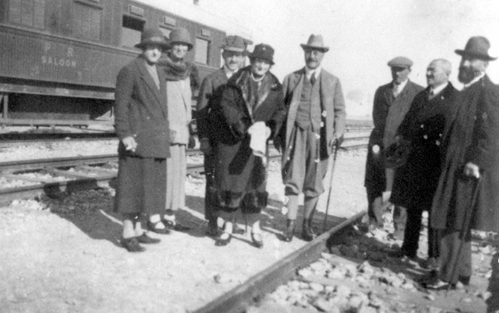 ביקור הלורד מלצט במפעל המלח בעתלית 1924 תחנת הרכבת במרכז, לידו אשתו מימין שני מהנדס ישראל קסל הוגה רעיון חב' המלח לידו מרדכי ארדון המנהל הראשון של החברה - מושבה כנרת/מוזיאון